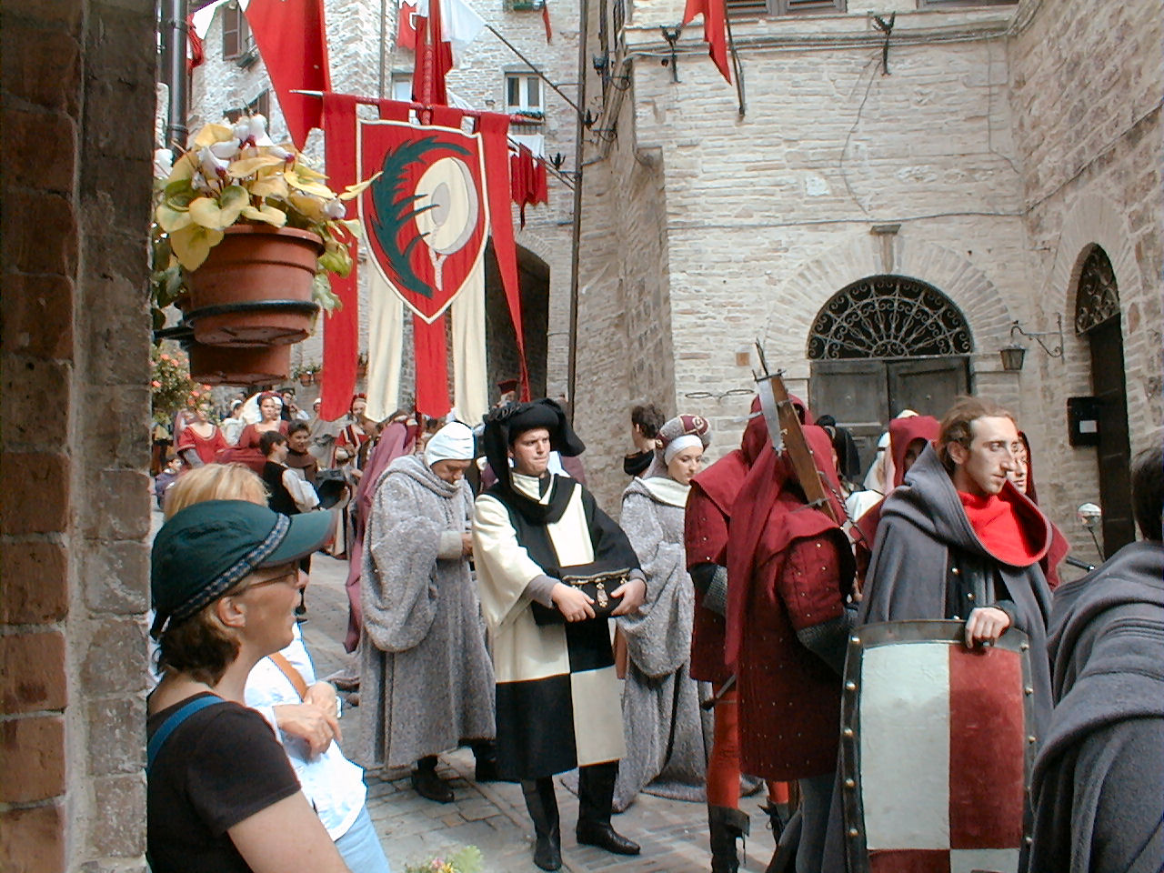 Assisi Calendimaggio